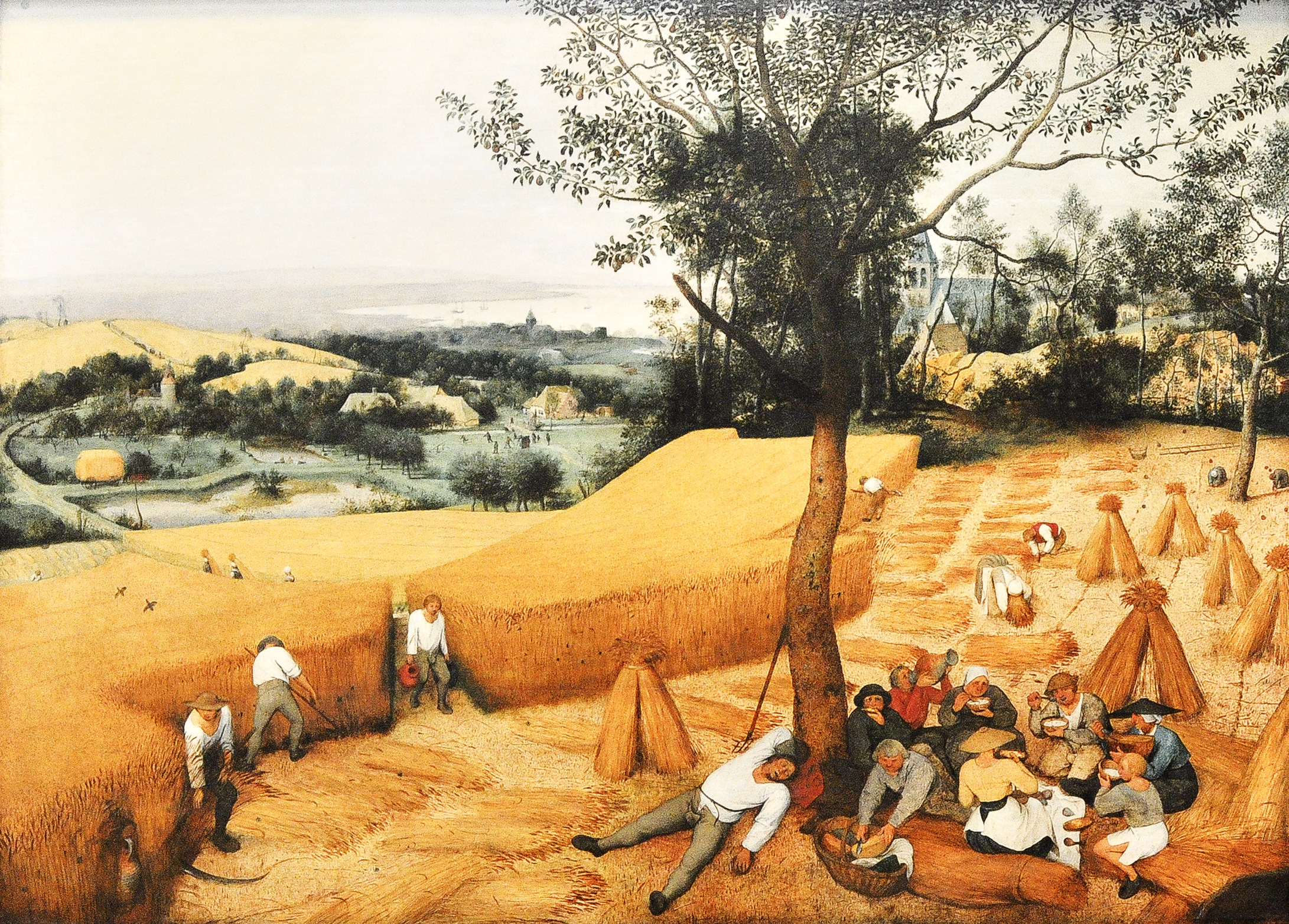 Pieter Bruegel de Oude (ca.1525–1569) - De oogst - The Met New York olie op hout